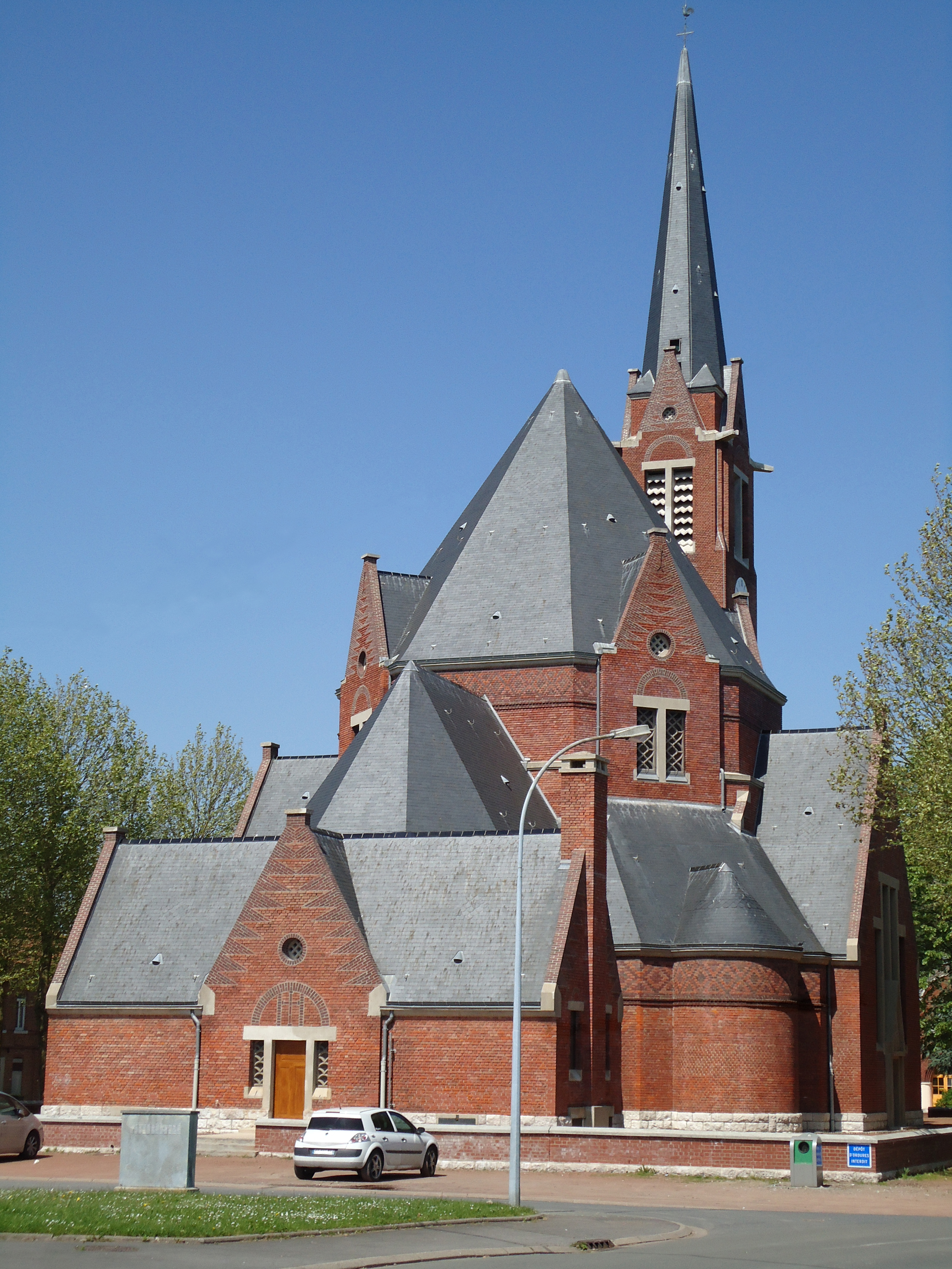 Eglise Saint Louis de Rouvroy .